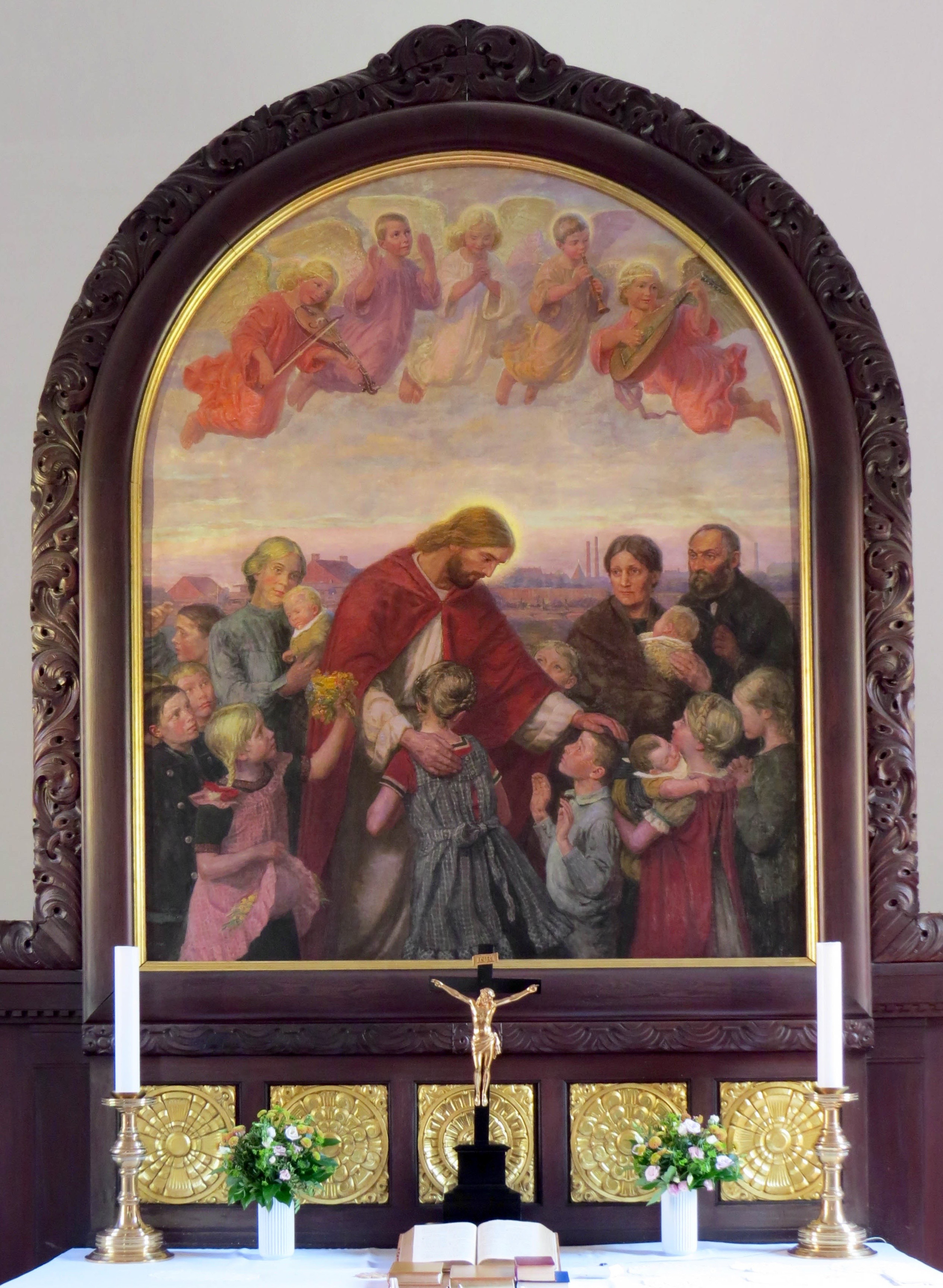 Altertavle fra Simeons Kirke, Nørrebro, København